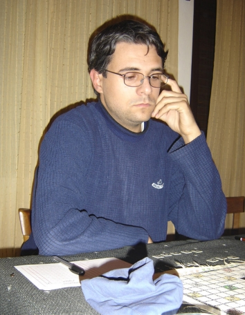 Nikola Živanović, novinar i enigmat iz Sombora, igra kvizovku